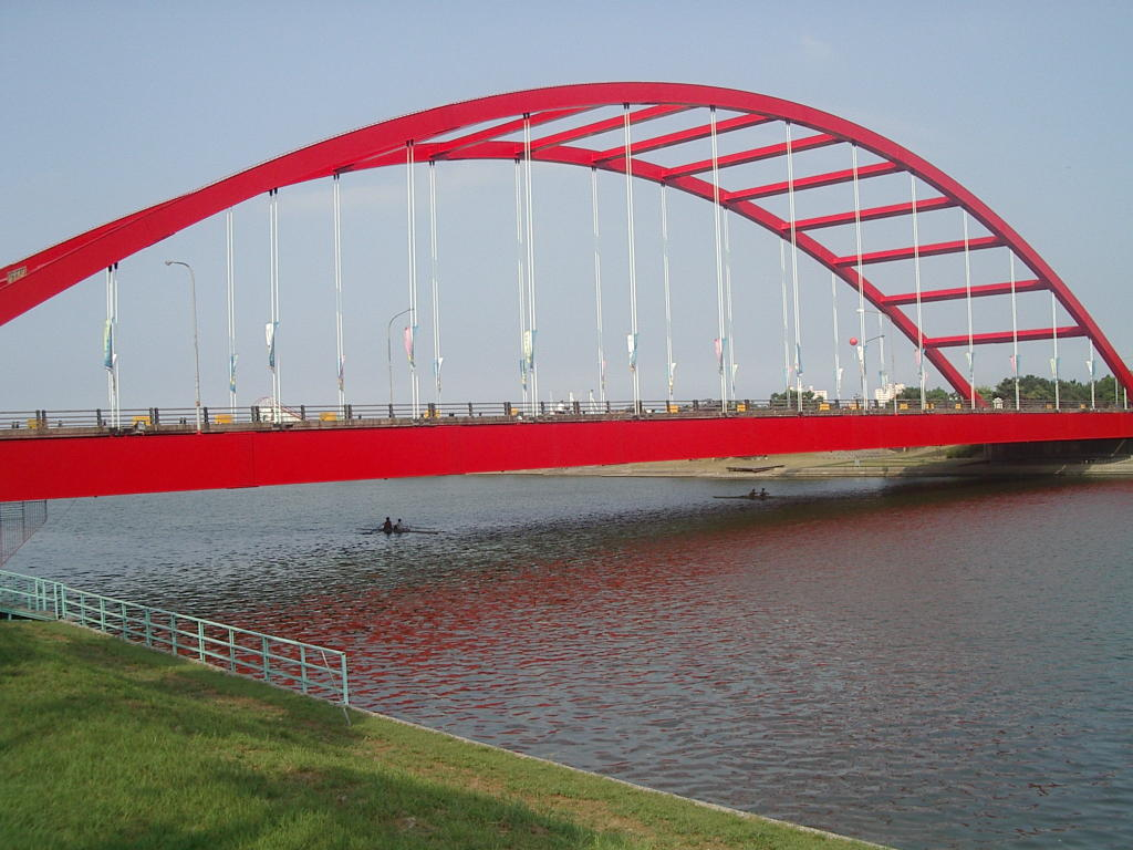 臺灣宜蘭縣冬山河。此圖為本人所照，之前被管理員刪除，現補上說明。